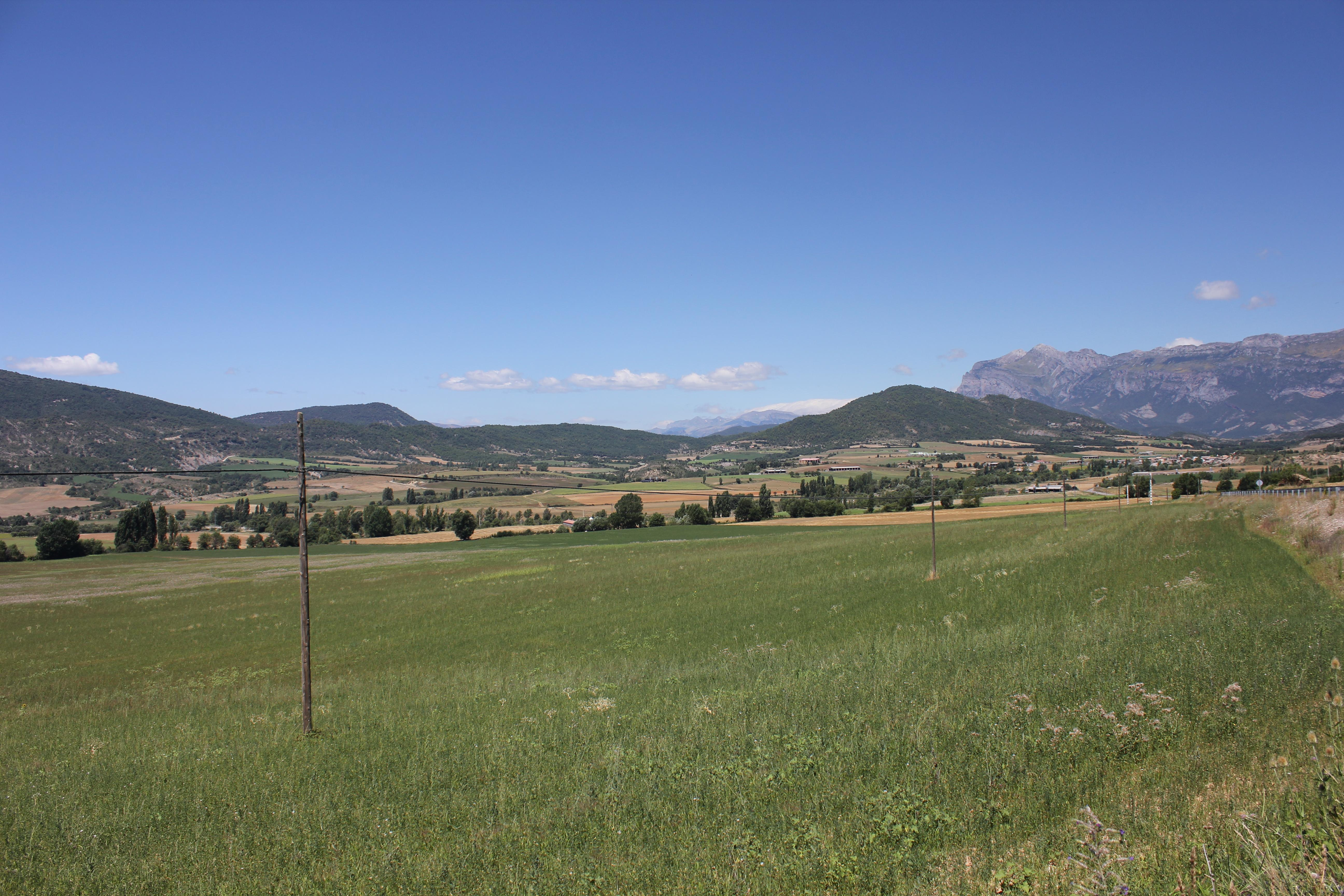 Aragonés: A Fueva